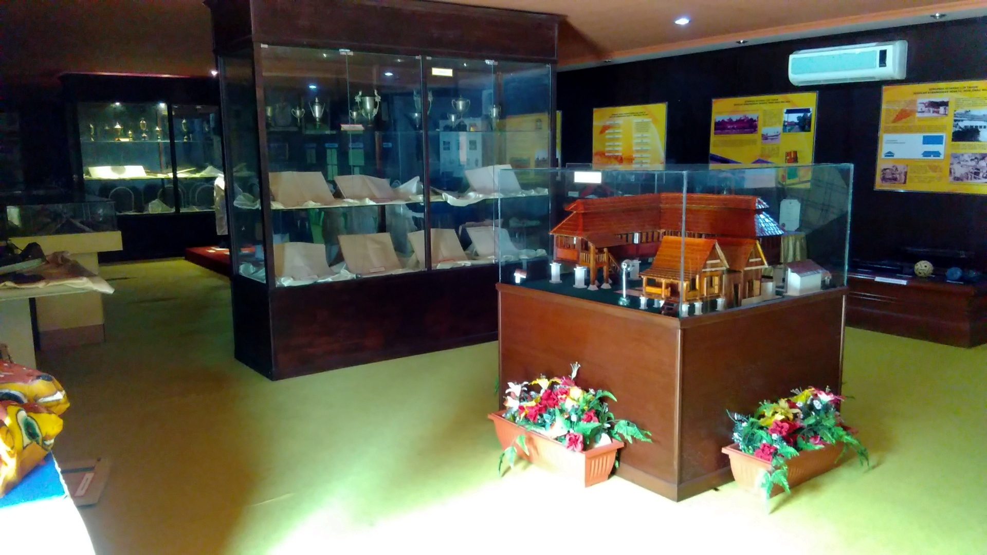 Ruang 3